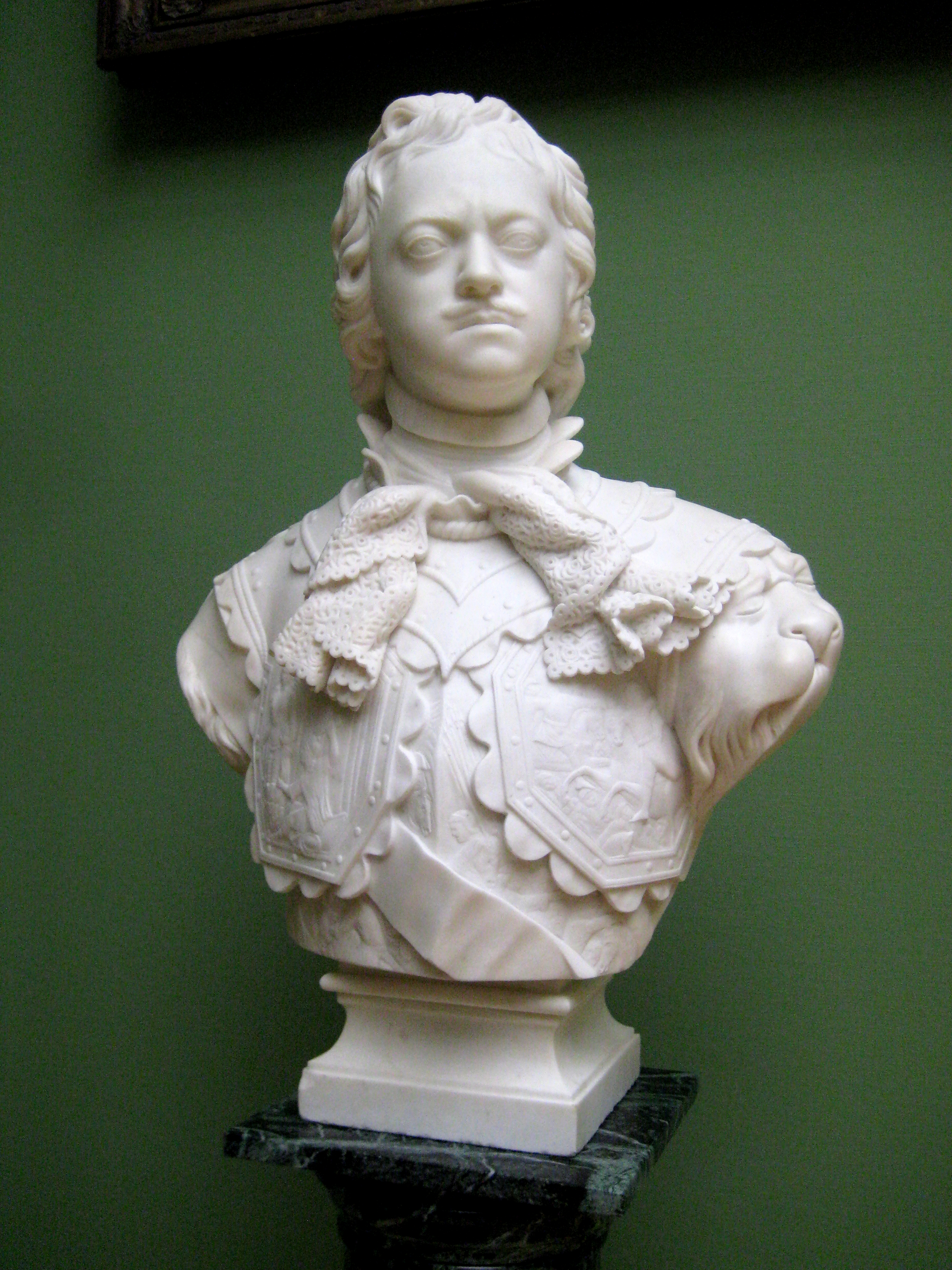 Н.Ф. Жилле. Портрет Петра I. Тип Б.К. Растрелли. Мрамор. ГТГ